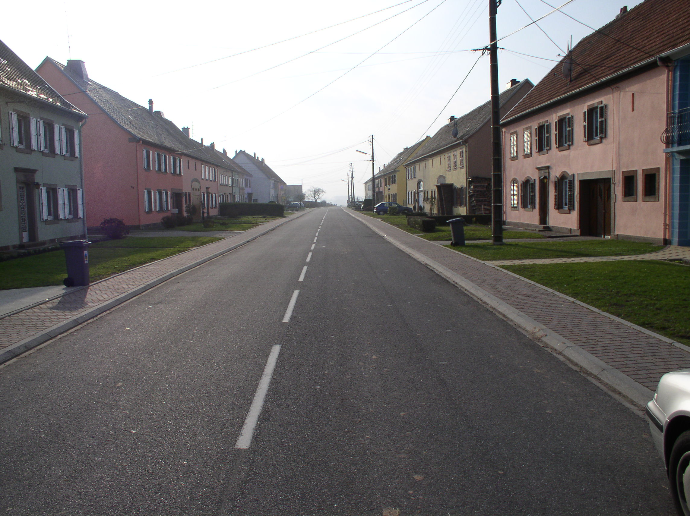 village-rue lorraine avec usoirs, Saint-Louis, Moselle